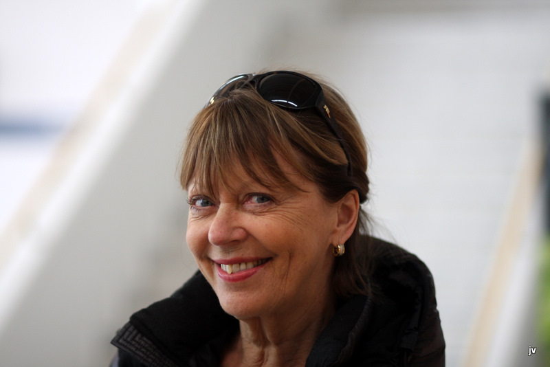 Lill Lindfors in Stavanger March 26 2009